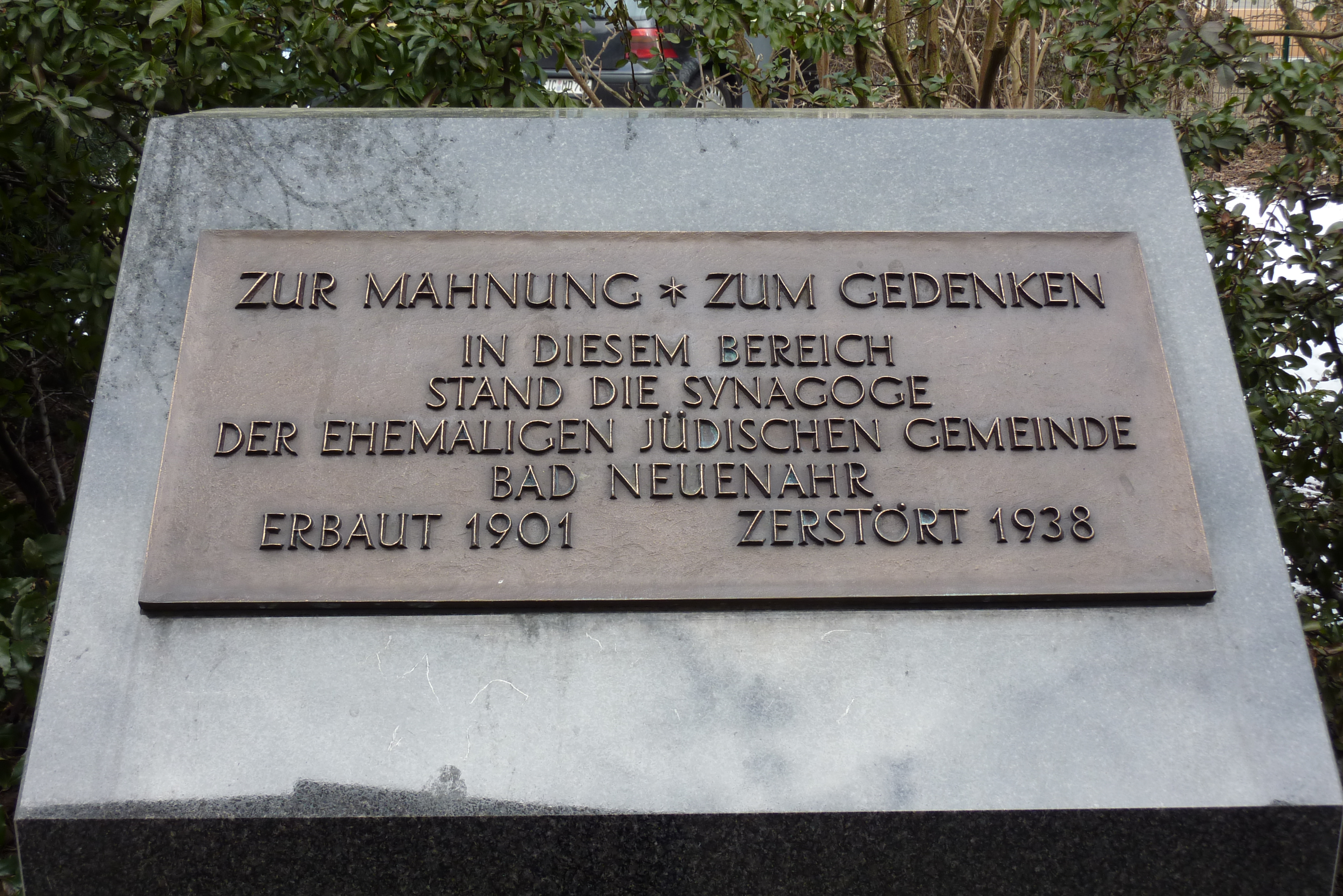 Gedenkstein für die Synagoge in Bad Neuenahr